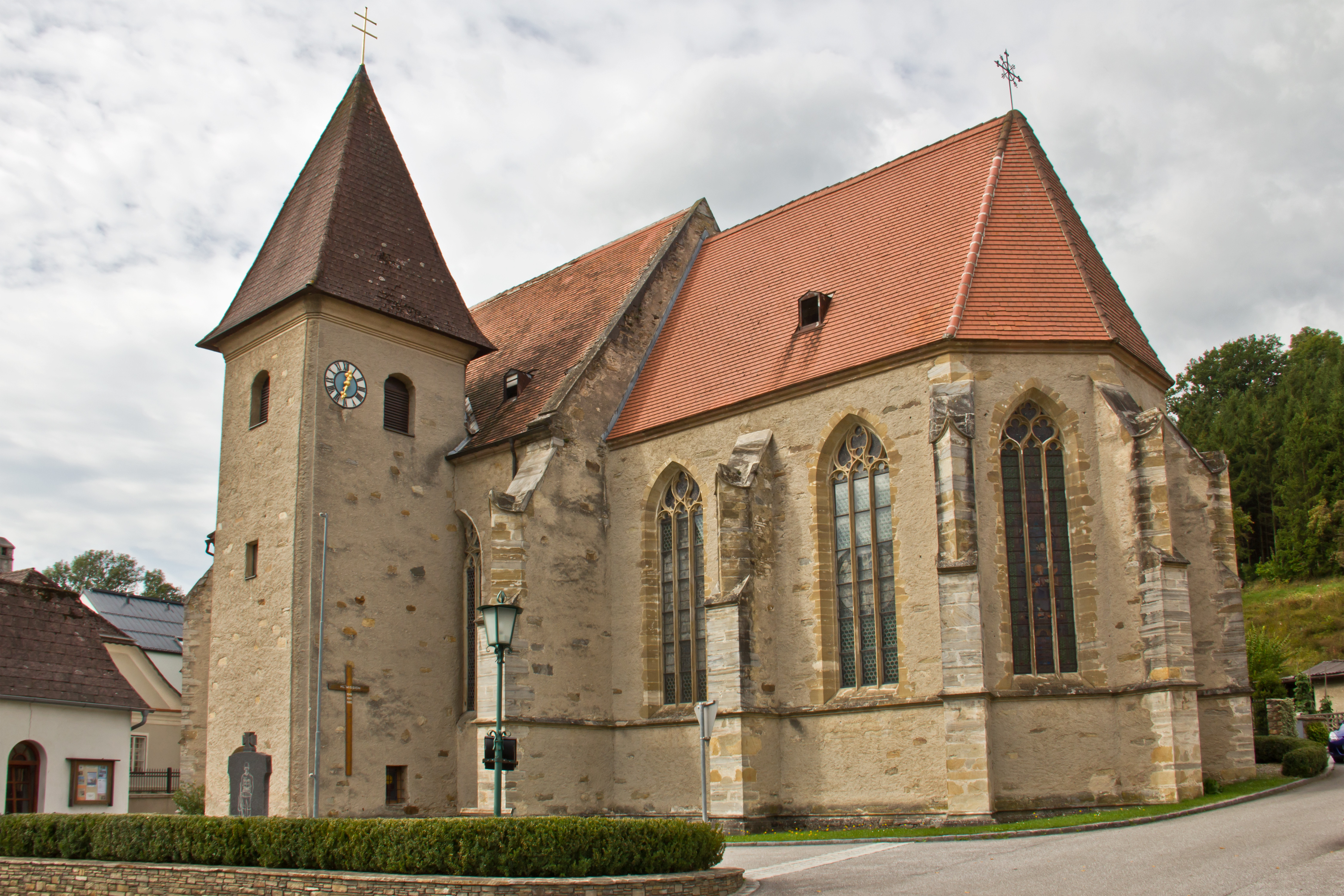 Die dem hl. Andreas geweihte Pfarrkirche von Heiligenblut ist eine spätgotische Hallenkirche mit steilem Dach und spätbarockem Südturm. Sie ist im Norden von einem Friedhof mit Bruchsteinmauer, im Westen vom Pfarrhof und im Süden von der sogenannten Ursprungskapelle umgeben.